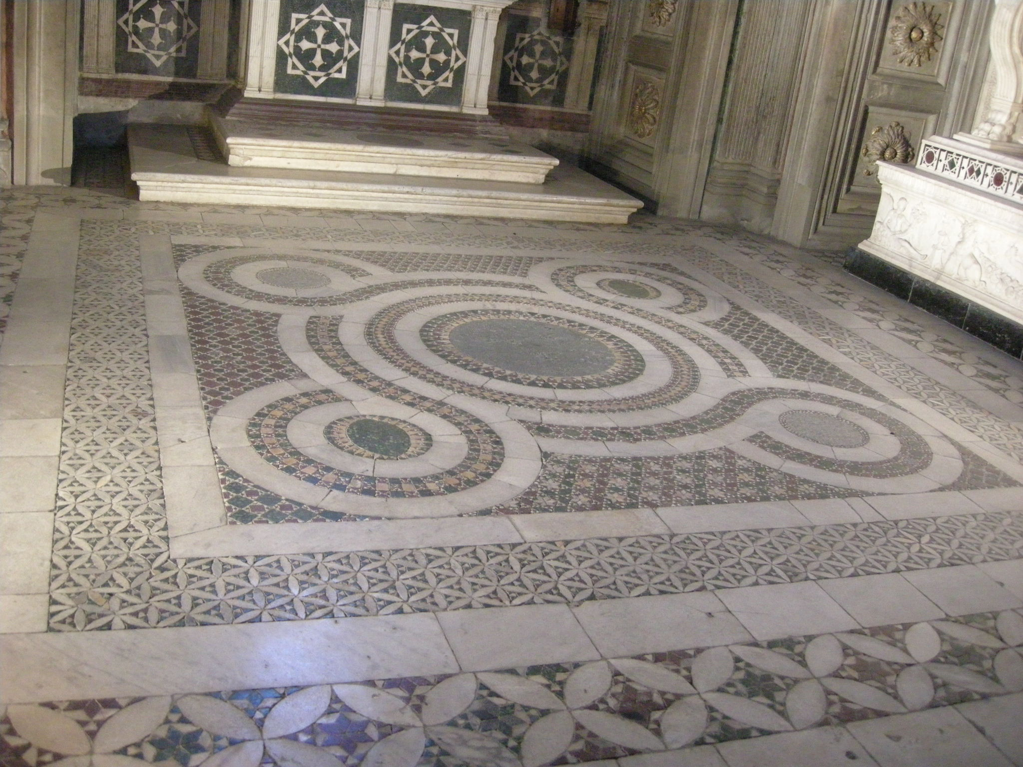 Cappella del cardinale di portogallo 08 pavimento 01